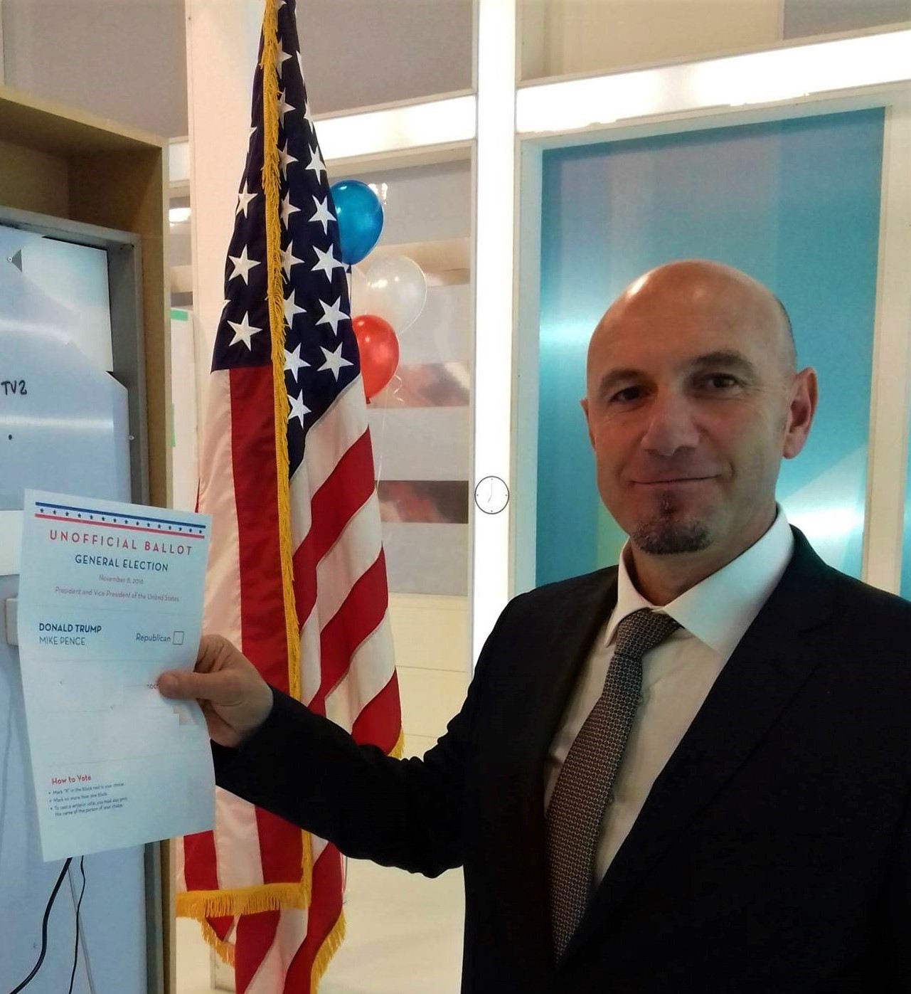 Lideri i JGP-së Adem Hodža pranë flamurit të SHBA-ve